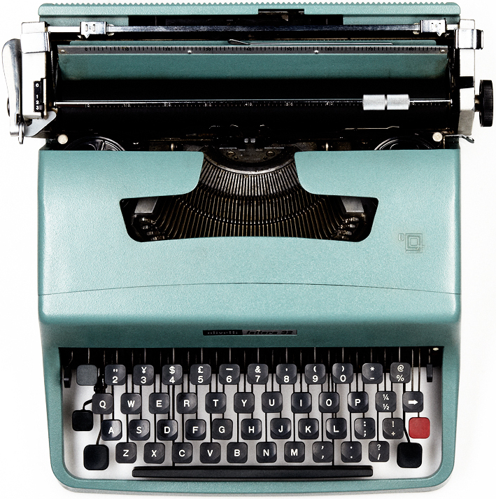 Olivetti Lettera 32 Typewriter